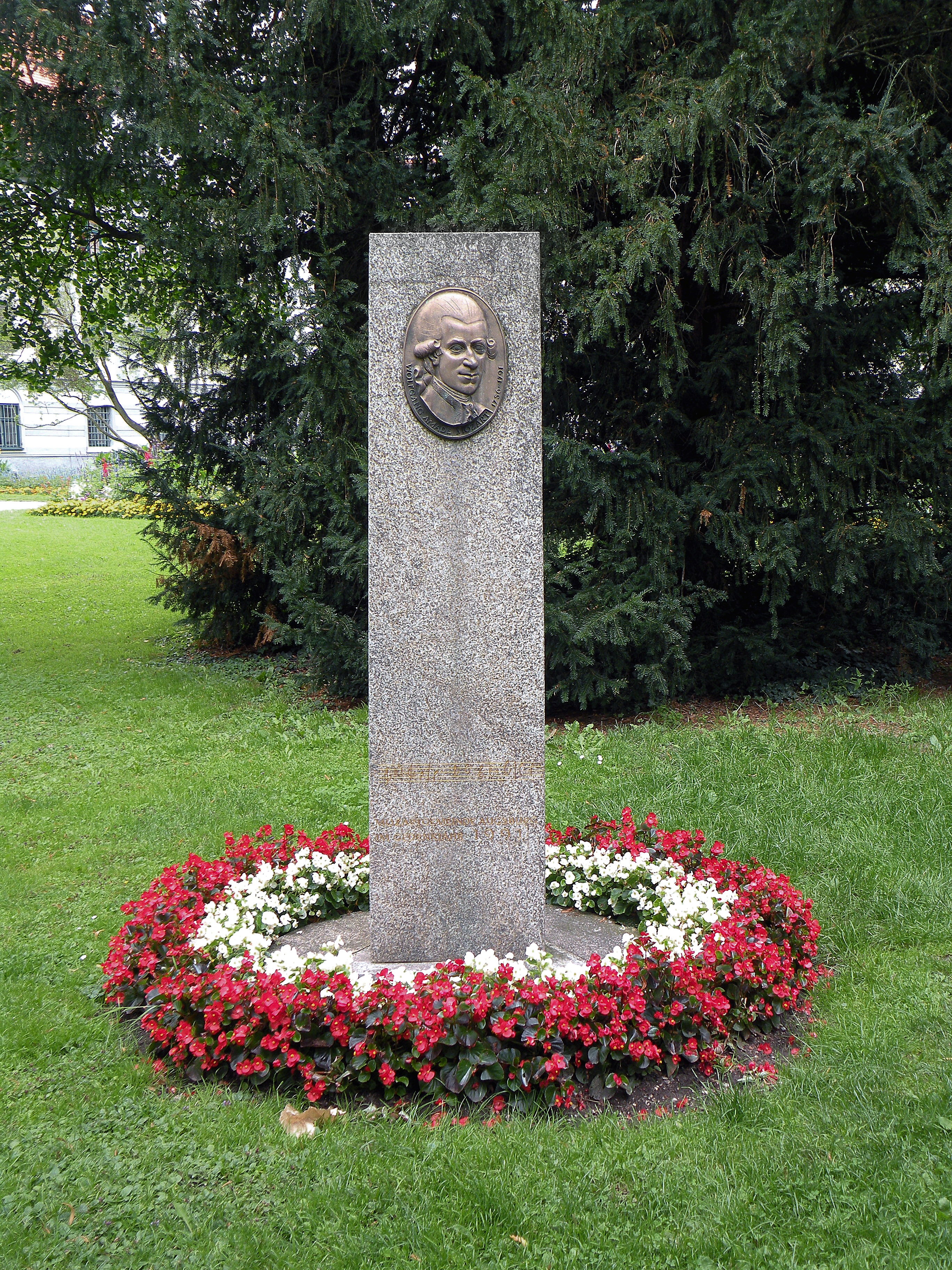 Augsburg.Mozart monument.